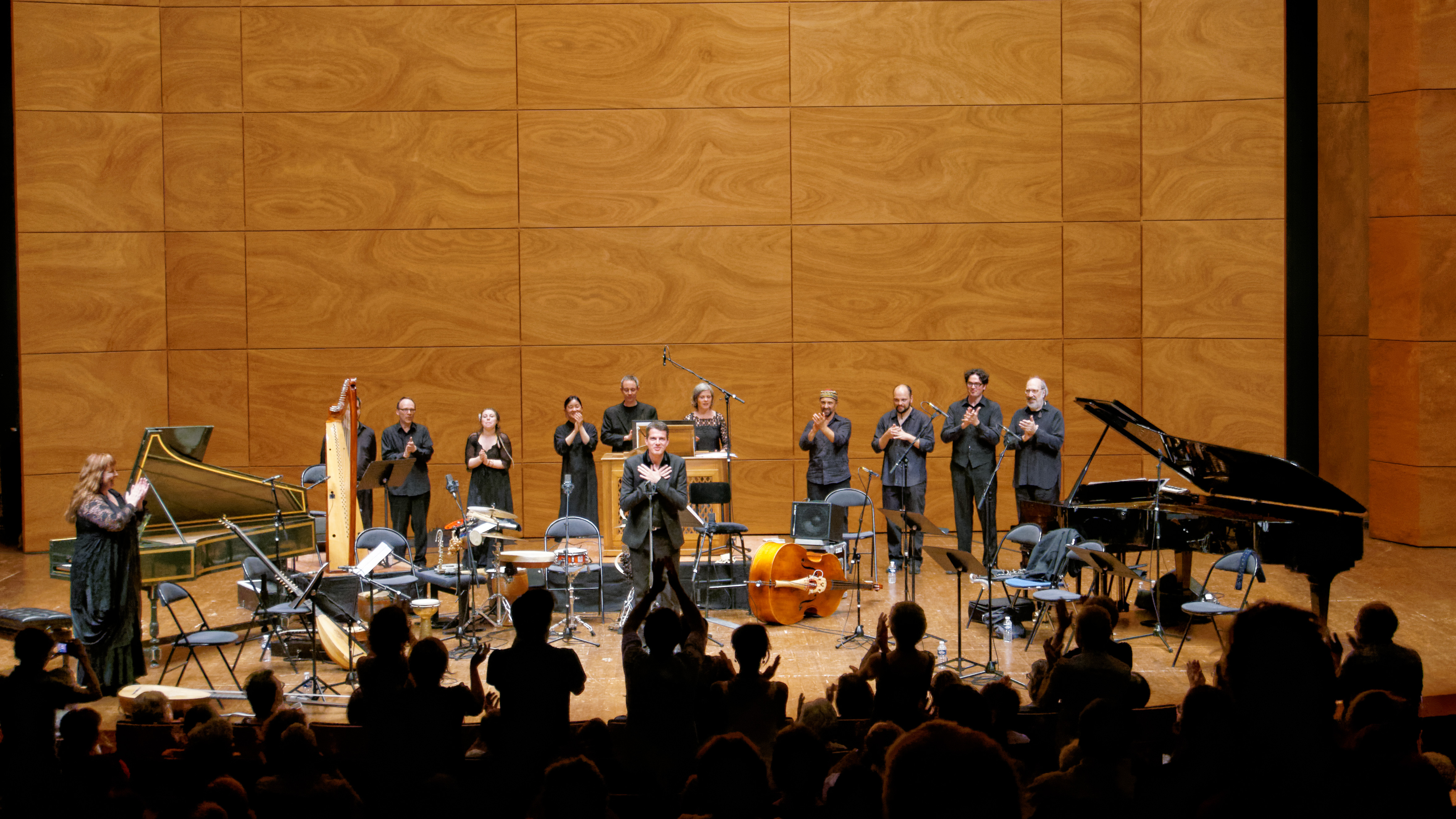 Philippe Jaroussky et l'ensemble l’Arpeggiata dirigé par Christina Pluhar saluent à l'issue d'une représentation du programme « Music for a while » donné le 27 juin 2014 à la MC2 de Grenoble.